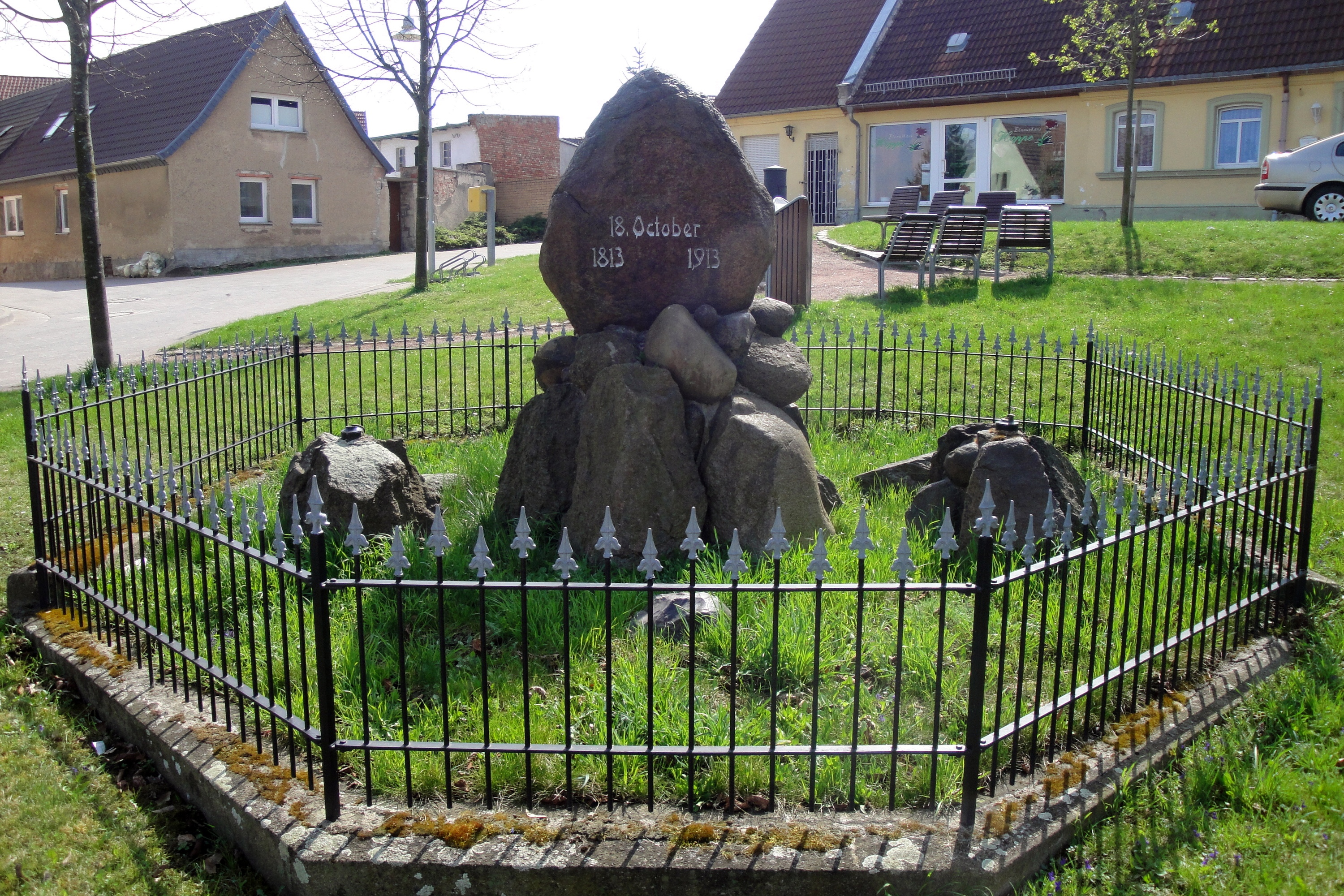 Völkerschlacht-Denkmal in Wulfen (Landkreis Anhalt-Bitterfeld)